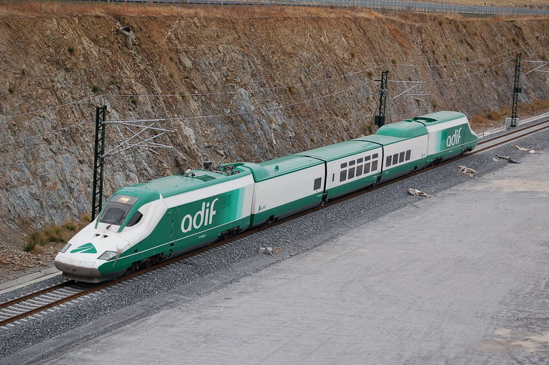 El tren auscultador de Adif, A-330, saliendo de la estación de Segovia dirección Valladolid en las pruebas del día 22 de Noviembre de 2007.